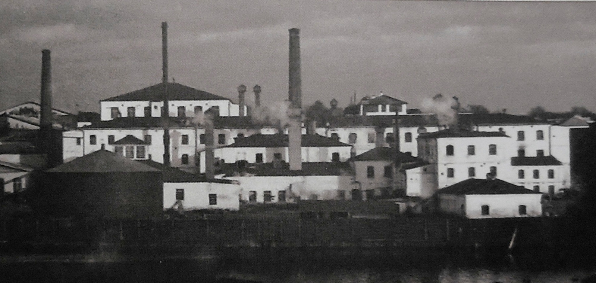 Фабрика Товарищества мануфактур наследников Н.Ф.Зубкова